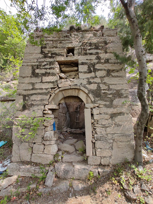 龙山摩崖造像